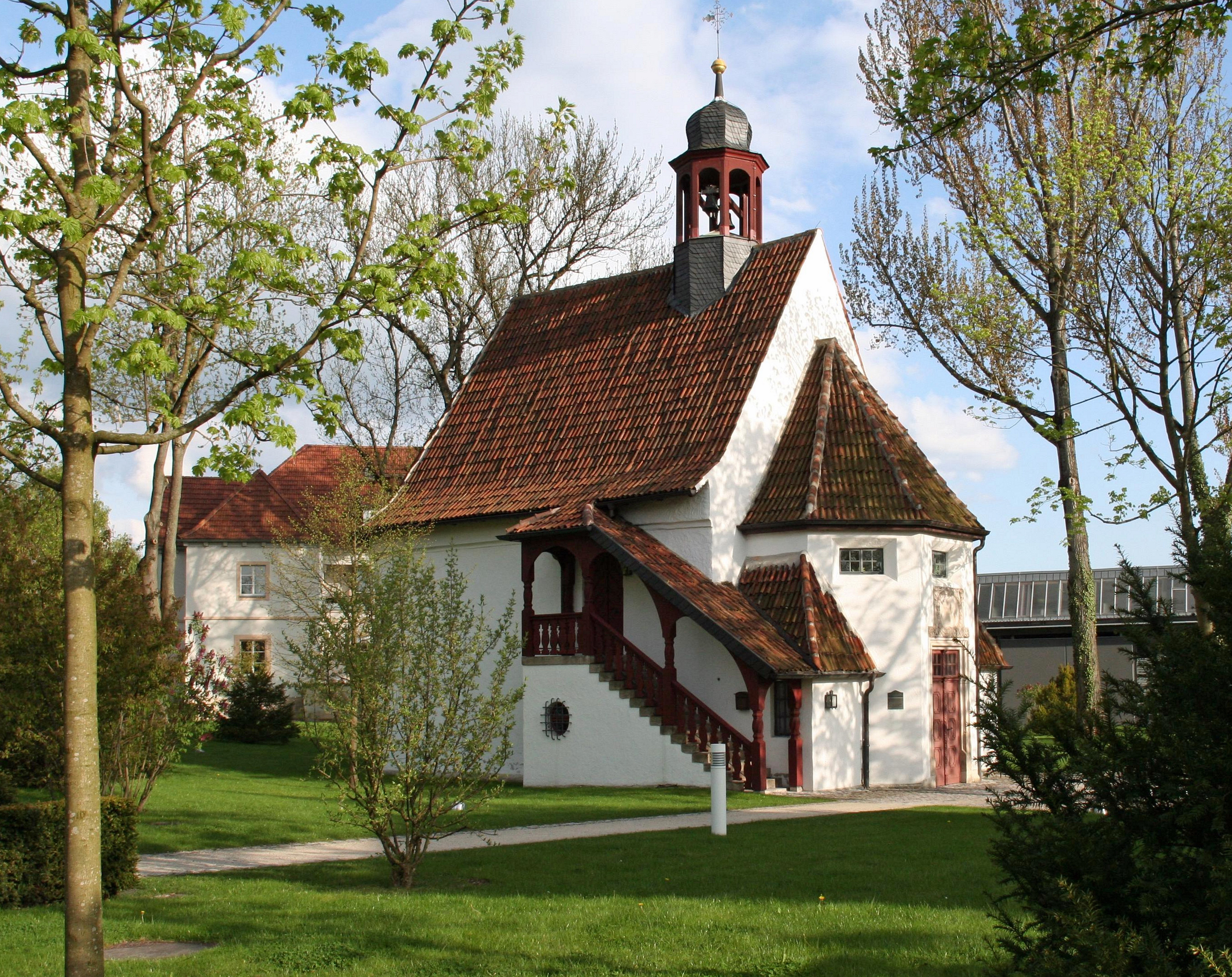 Nikolauskapelle, Coburg (Germany)